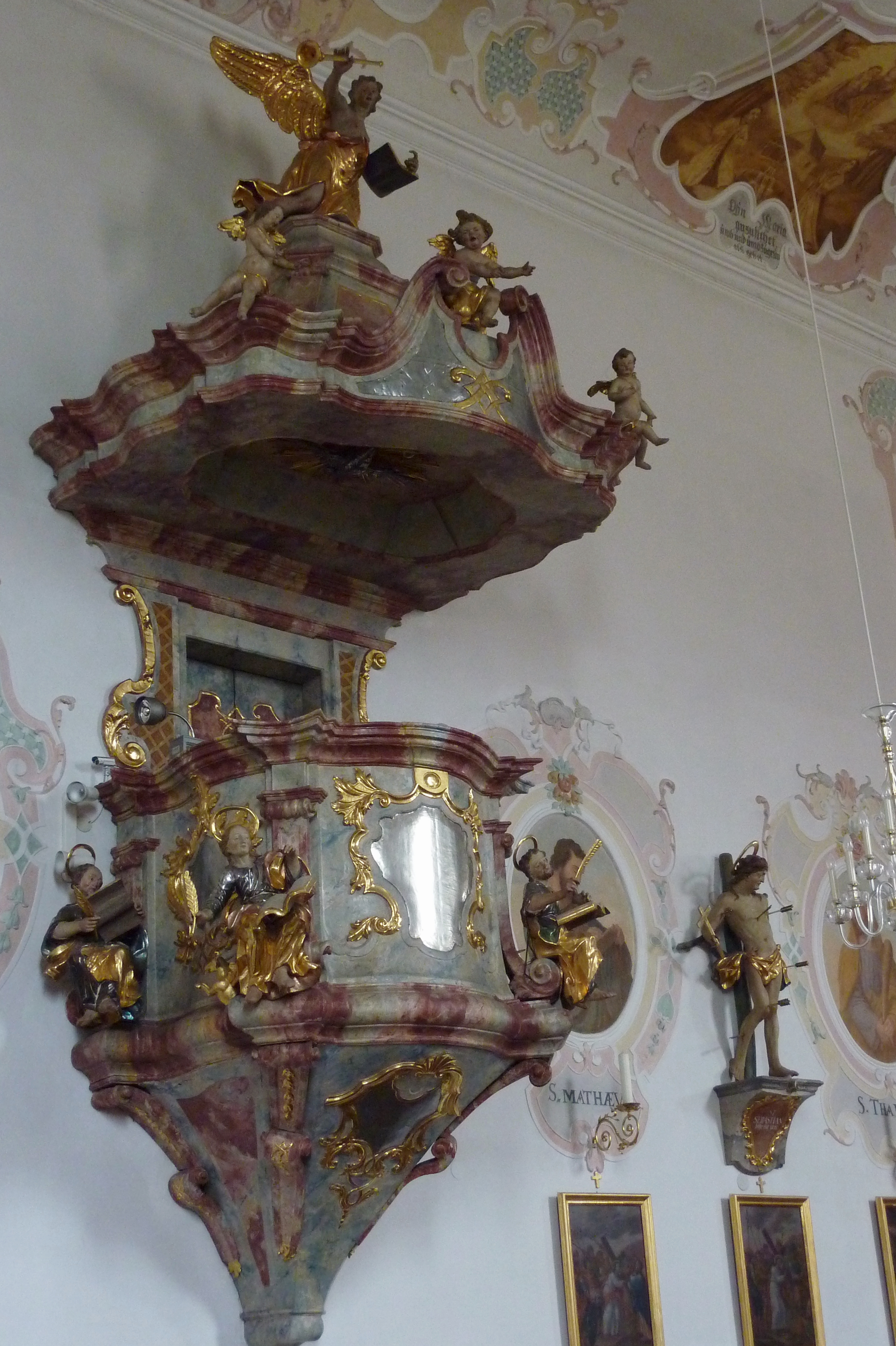 Katholische Pfarrkirche St. Georg in Aislingen im Landkreis Dillingen an der Donau (Bayern), Kanzel von Anton Berkmüller von 1743, Figuren von Franz Karl Schwertle